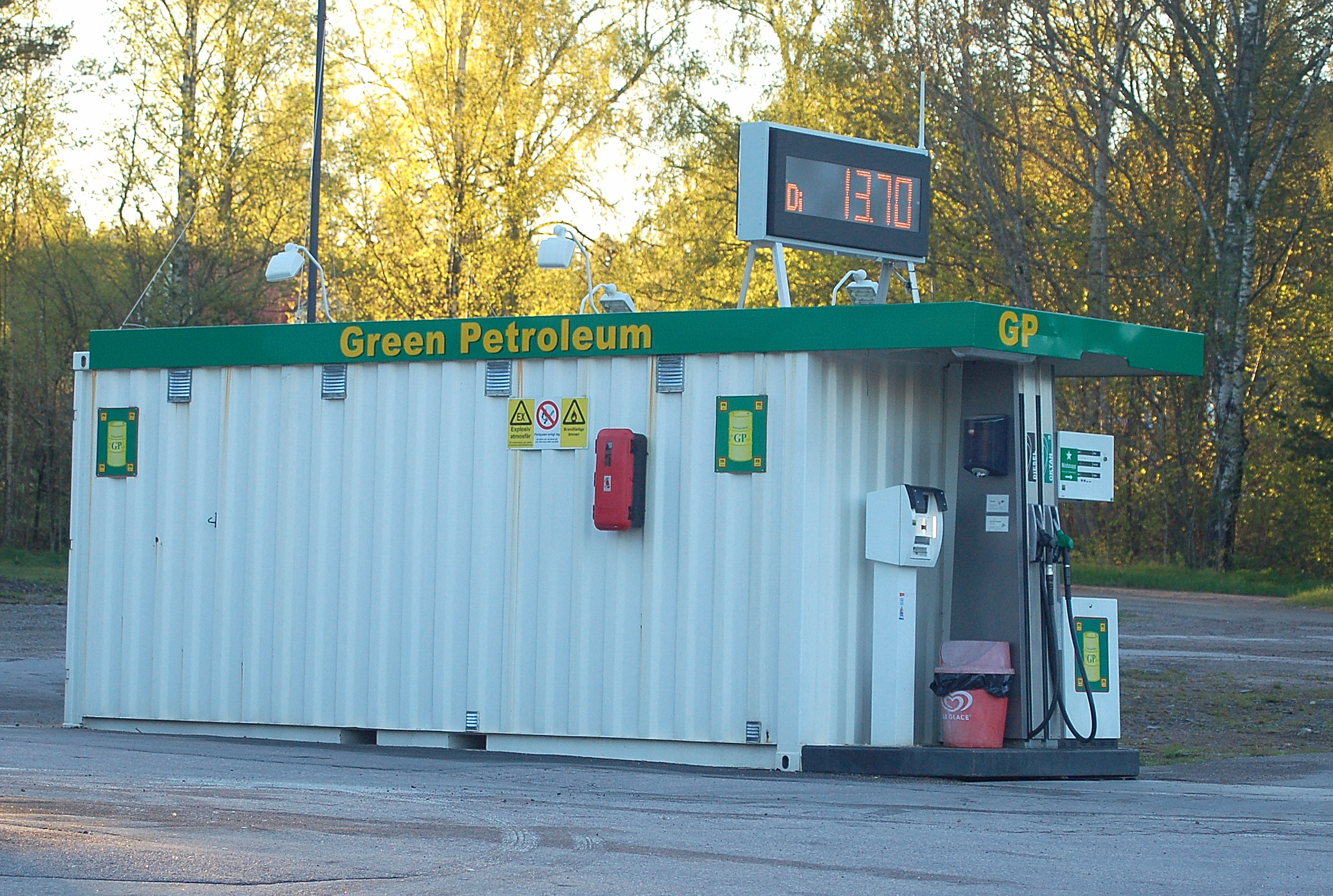 Green Petroleums bränsledepå i Mullhyttan.